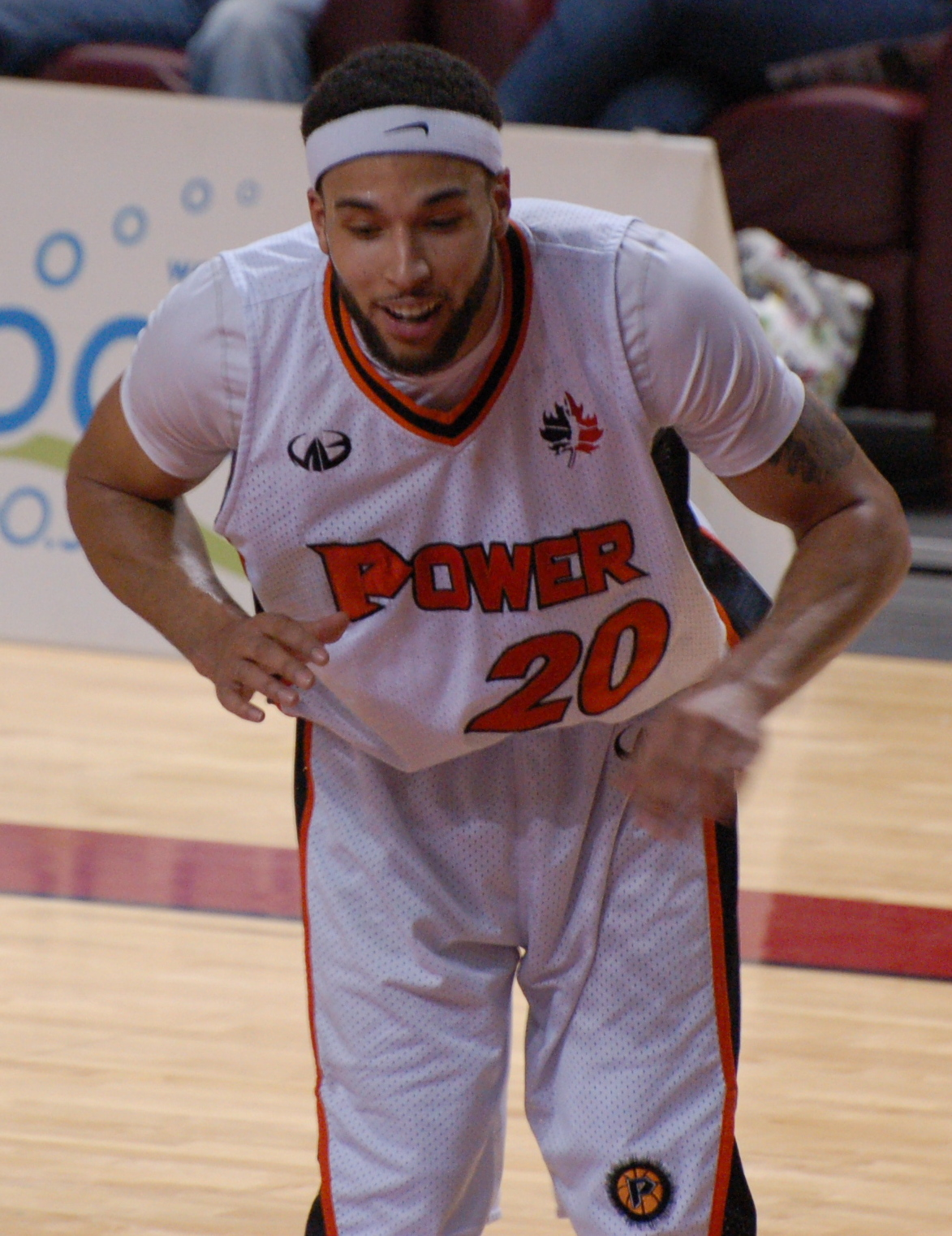 Summerside Storm vs Oshawa Power: Morgan Lewis (#20)